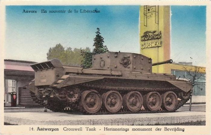 — Cromwell Mark V (T 121813) in Antwerpen, ansichtkaart circa 1947 — Anvers En souvenir de la Libération / 14. Antwerpen Cromwell Tank - Herinnerings monument der Bevrijding